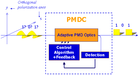 Česky: Grafické znázornění PMD kompenzace zkresleného optického impulsu